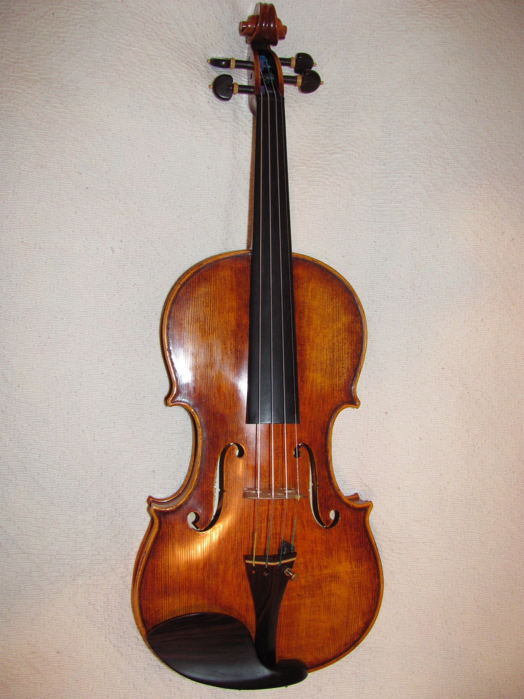 violino copia di uno Stradivari, questo è un eccellente esempio dell'opera del maestro liutaio Alfredo Primavera